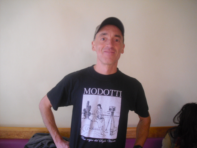 Photographie de José Carlos Fernandes